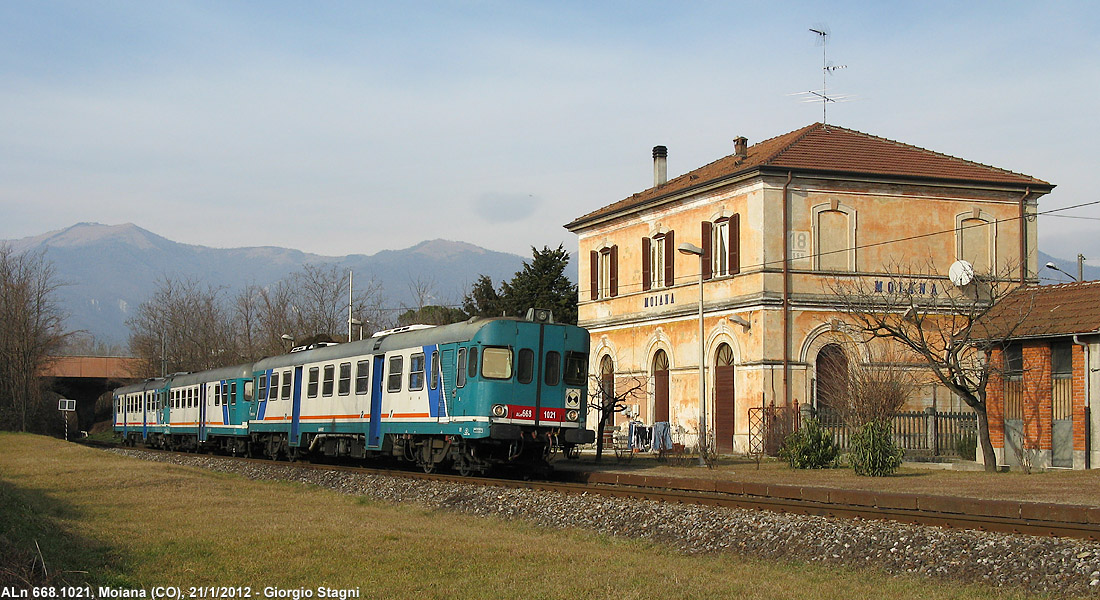 Stazione ferroviaria di Moiana, con treno di automotrici ALn 668 (in testa la 1021) inquadranti una rimorchiata Ln 664.